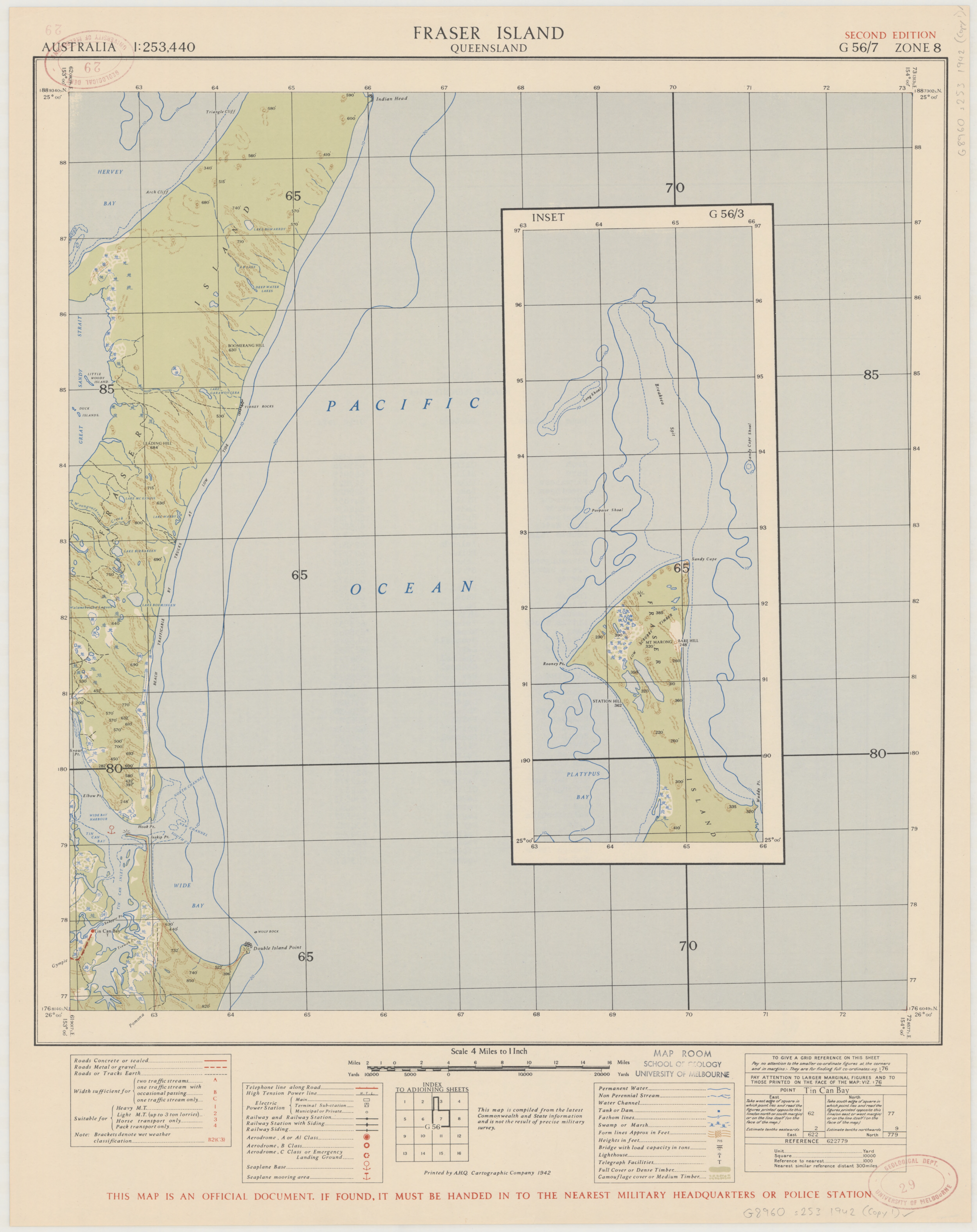 Topographic map sheet Fraser Island, scale 1:253,440, G 56/7 Zone 8, E 153⁰00'--E 154⁰00'/S 25⁰00'--S 26⁰00', original size 47 x 43 cm., on sheet 59 x 46 cm.